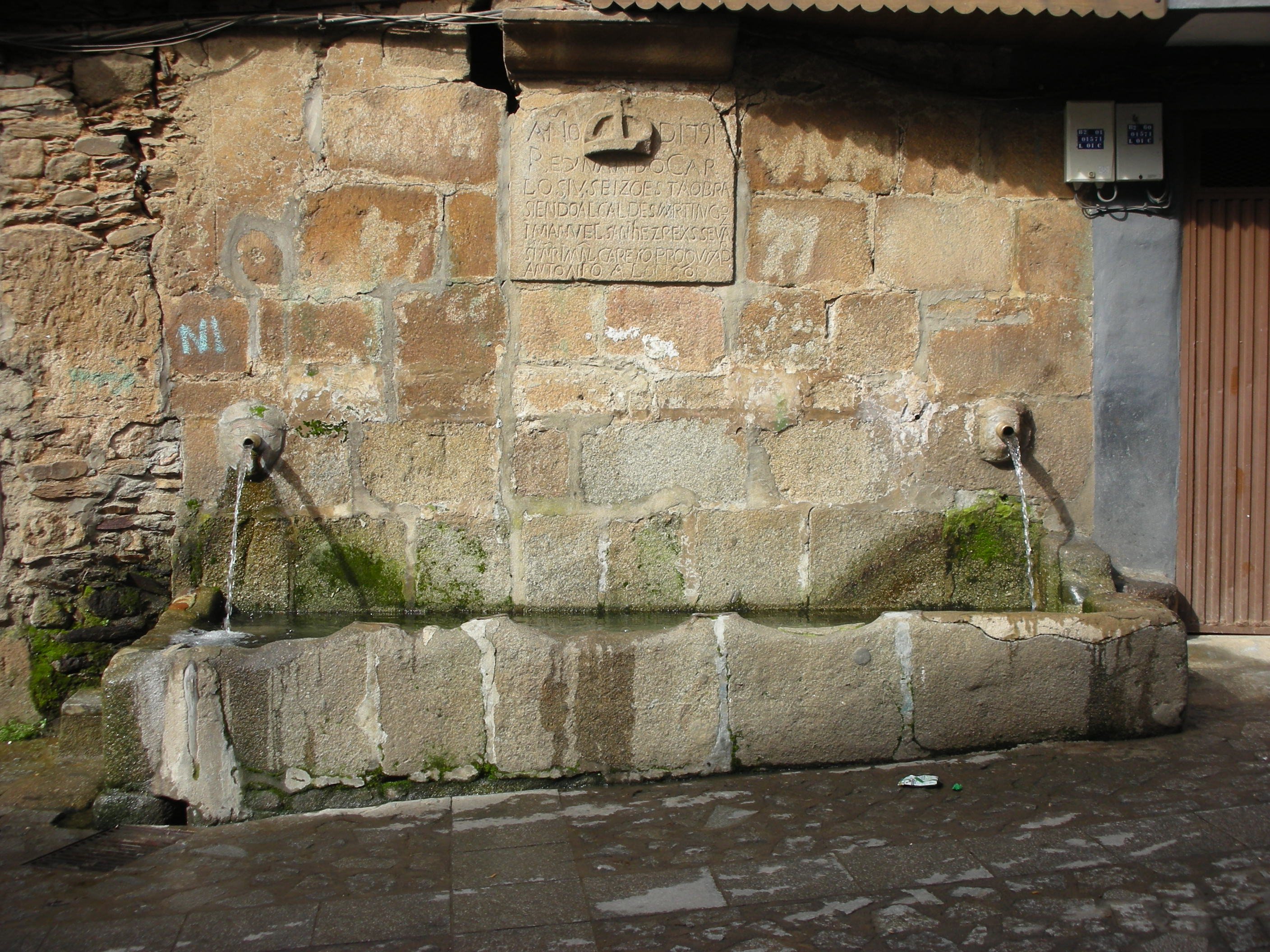 Fontaine El Pilon de la commune de Sotoserrano en Espagne